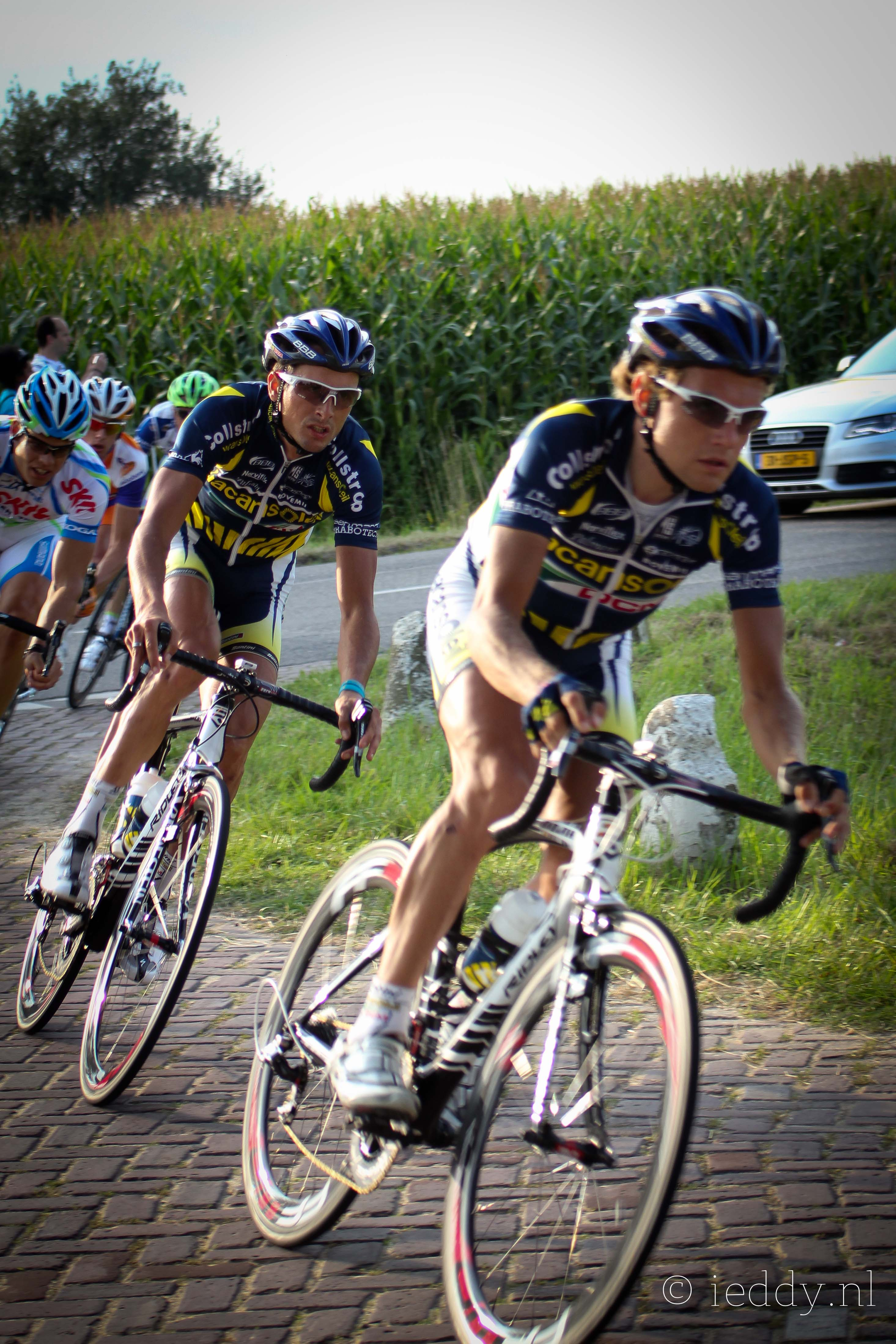 Vancansoleil Rob Ruijgh, Johnny Hoogerland Draai van de Kaai 2011